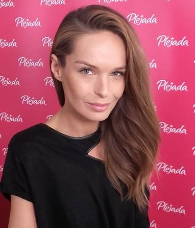 Polska aktorka i prezenterka telewizyjna Katarzyna Sowińska we wrześniu 2016 roku.